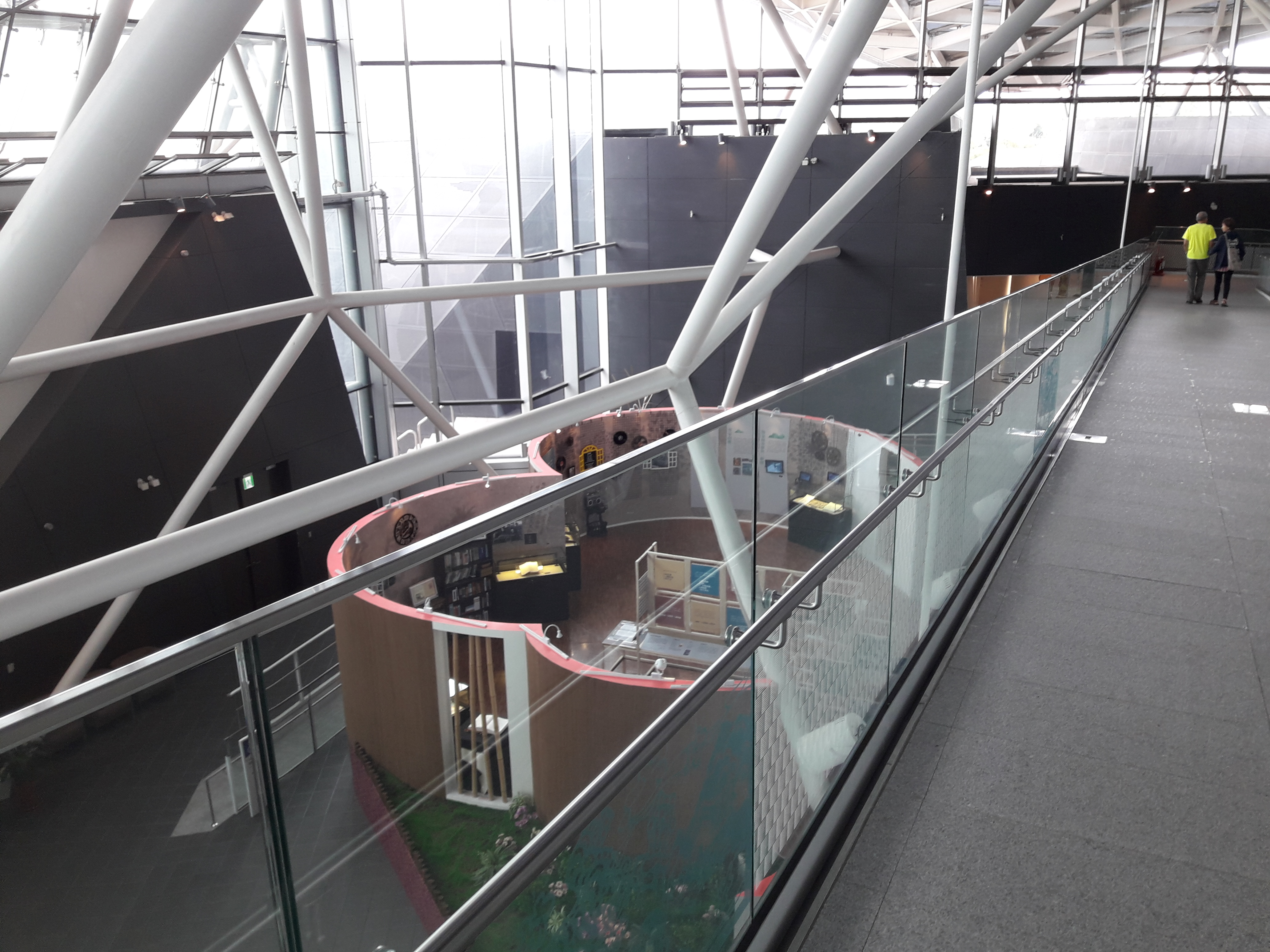 臺灣客家文化館館內一景。